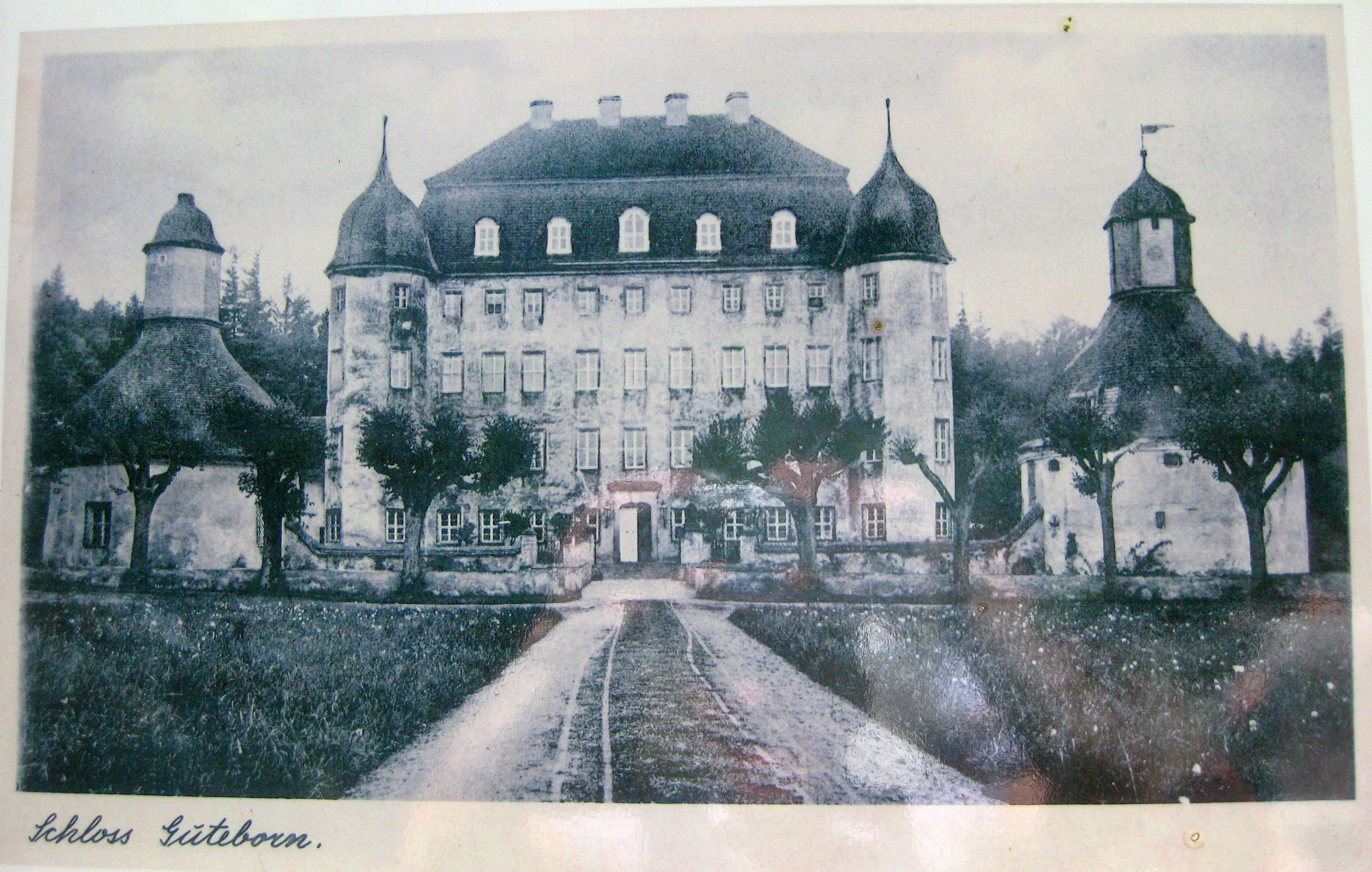 Schloss Guteborn, Nordostansicht, alte Postkarte